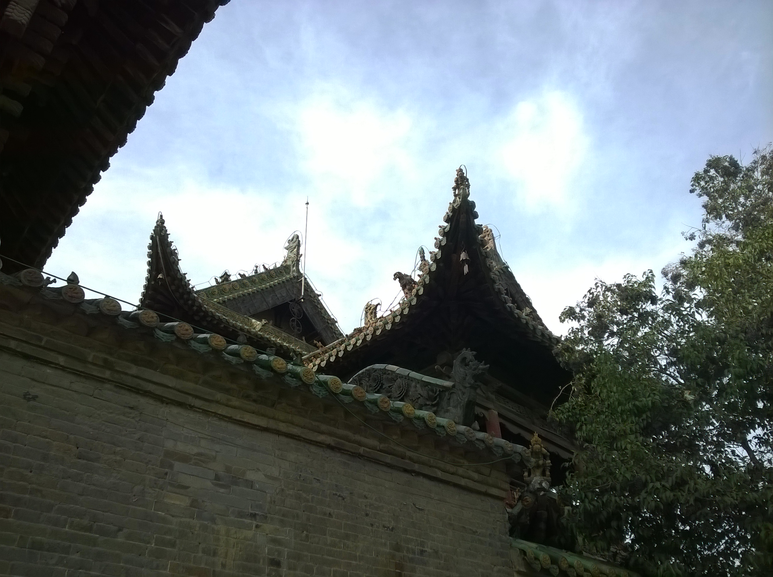 中文（中国大陆）: 山陕会馆内部